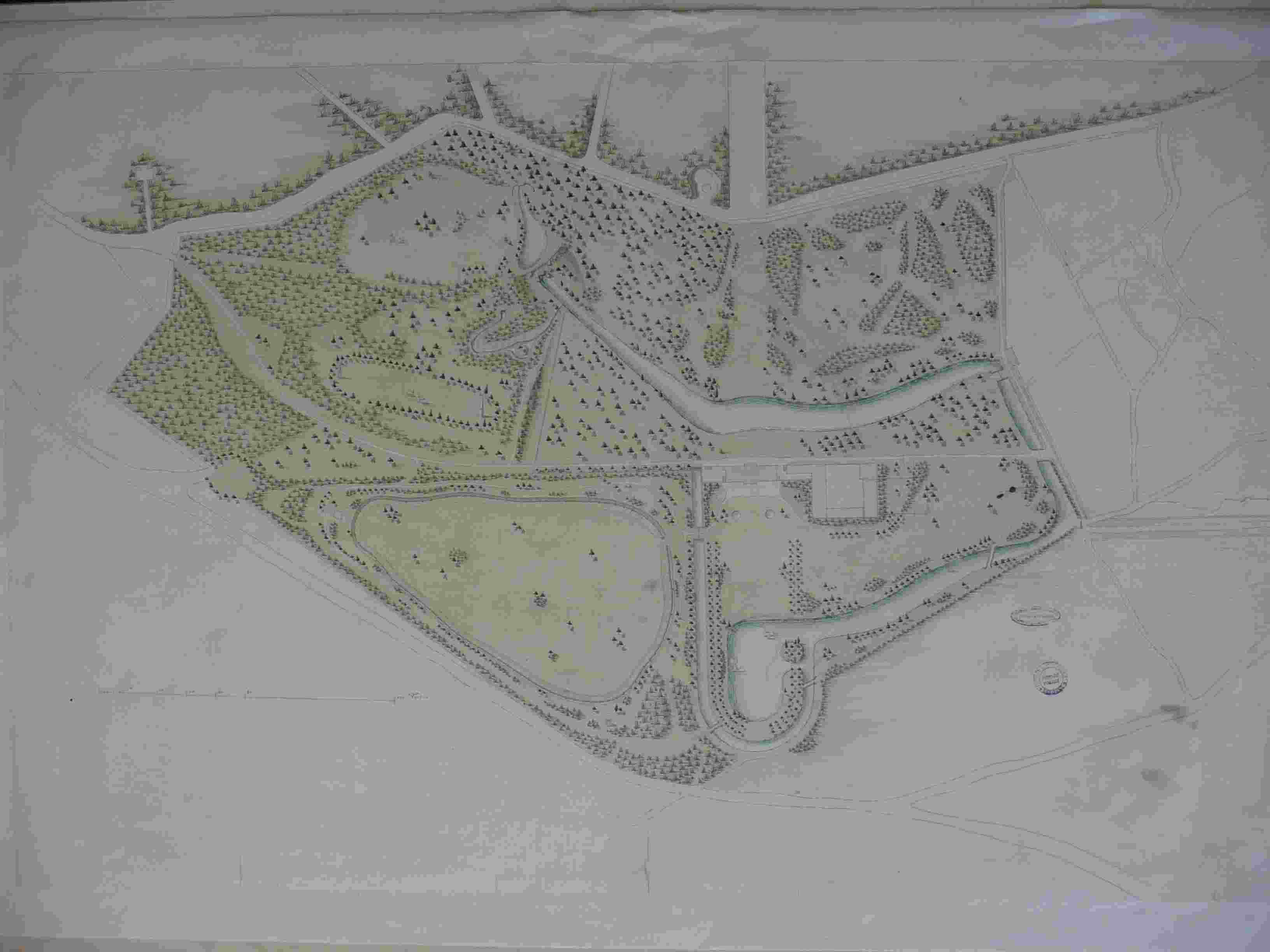 Segrez plan jardin anglais